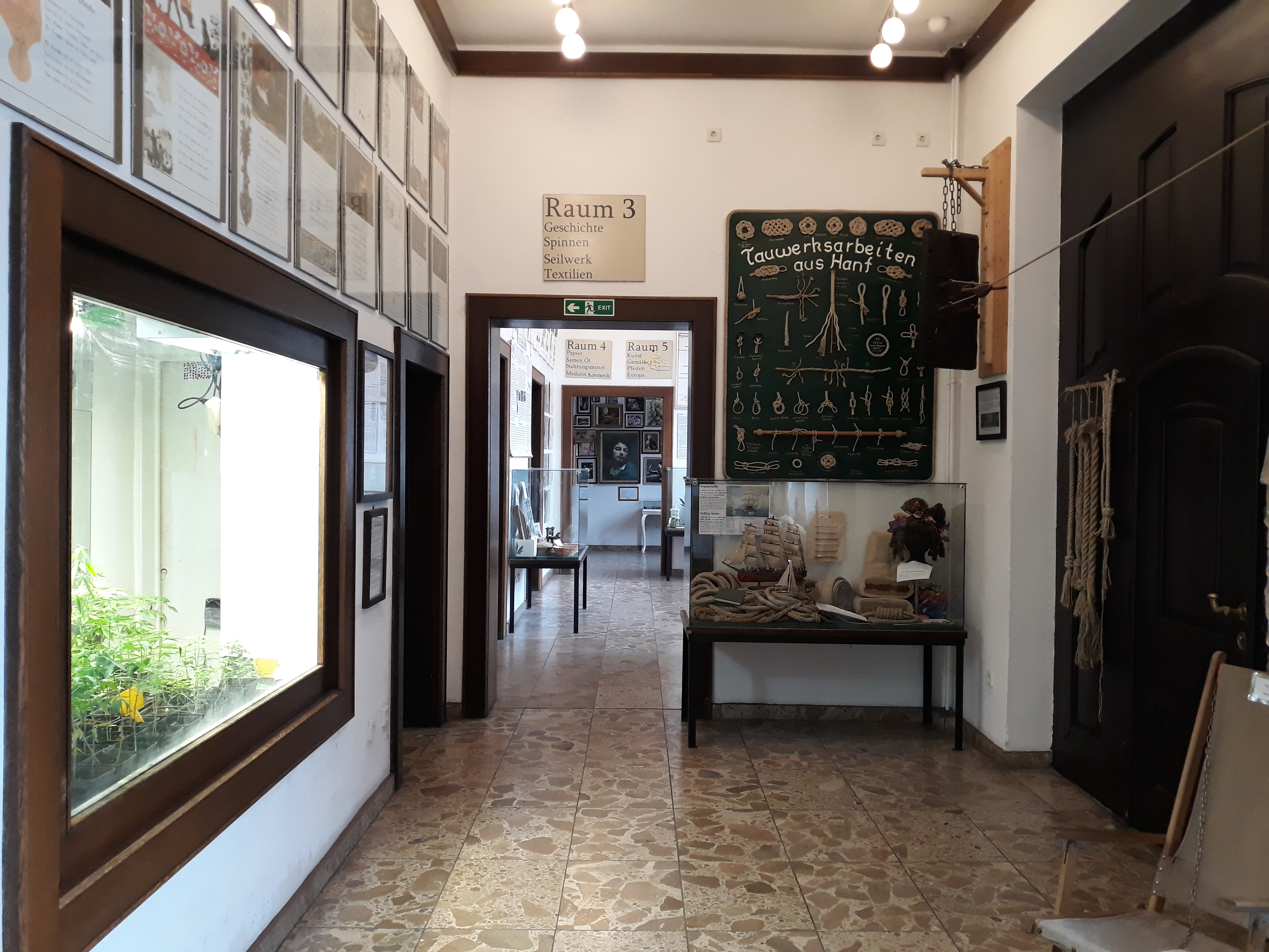 Hanf Museum Berlin (März 2019), Ausstellung